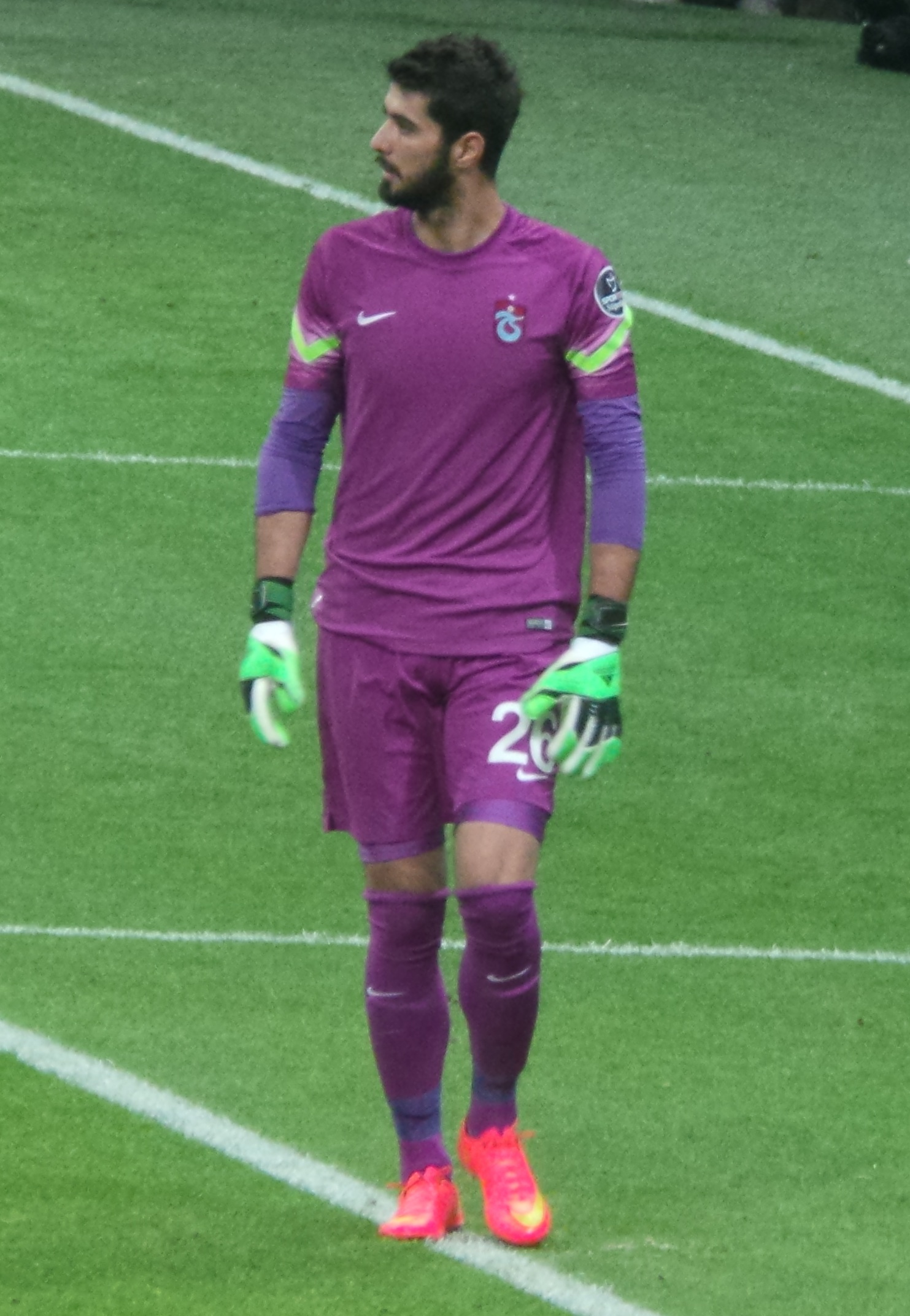 Fatih Öztürk